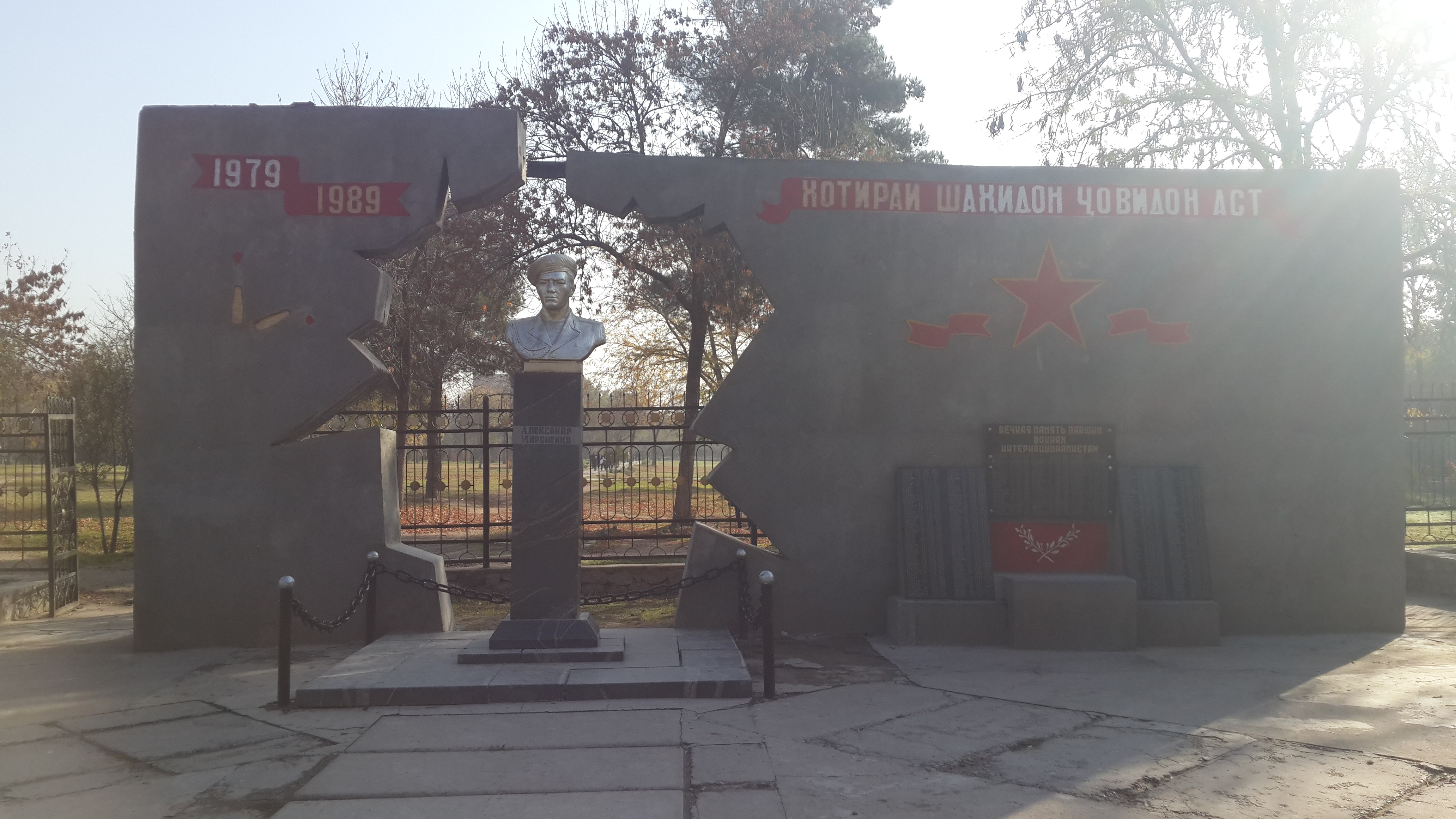 Бюст Александра Мироненко и памятный мемориал погибшим воинам в Афганской войне 1979-1989гг